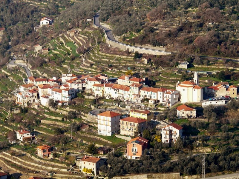 Panorama di Borgoratto (Lucinasco) da Chiusanico, Liguria, Italia